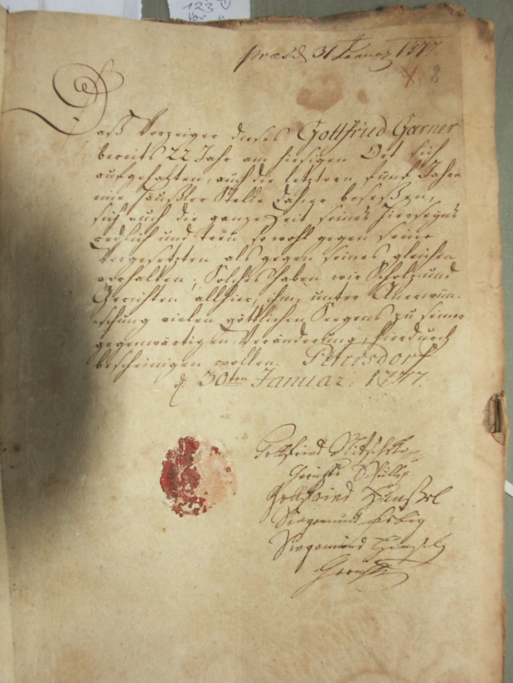 Losbrief eines eingewanderten Exulanten in Schlesien zur "Ansetzung" in einem Kolonistendorf